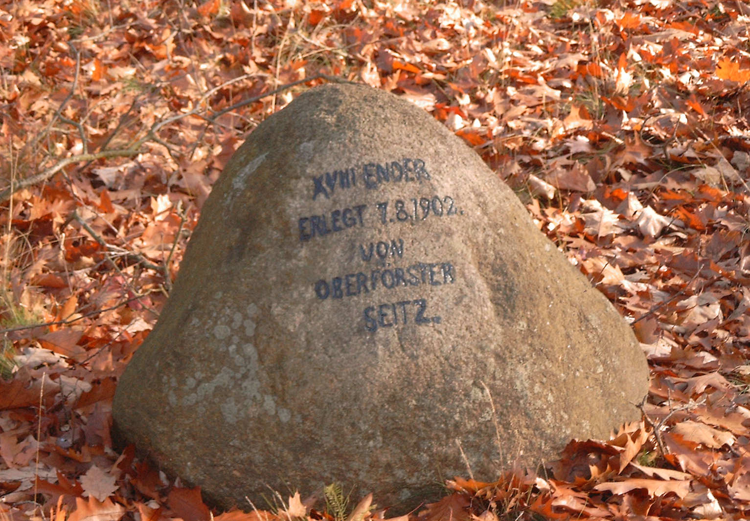 Gedenkstein am Hubertuseck kurz vor Mühlrose. Die Inschrift lautet: XVIII Ender erlegt 7. 8. 1902 von Oberförster Seitz.